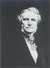 Photographie de Faustino Malaguti